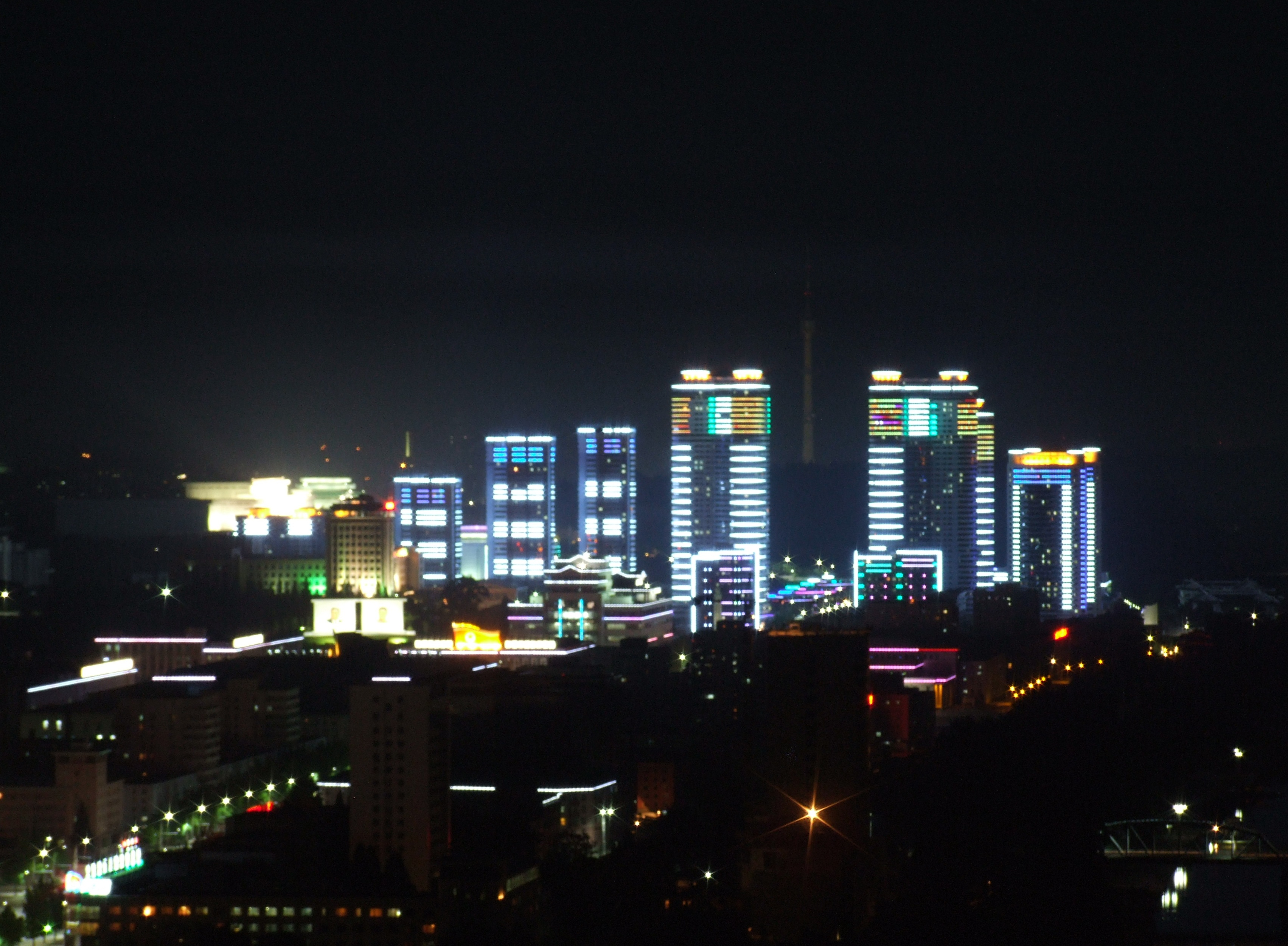 Pjöngjang bei Nacht